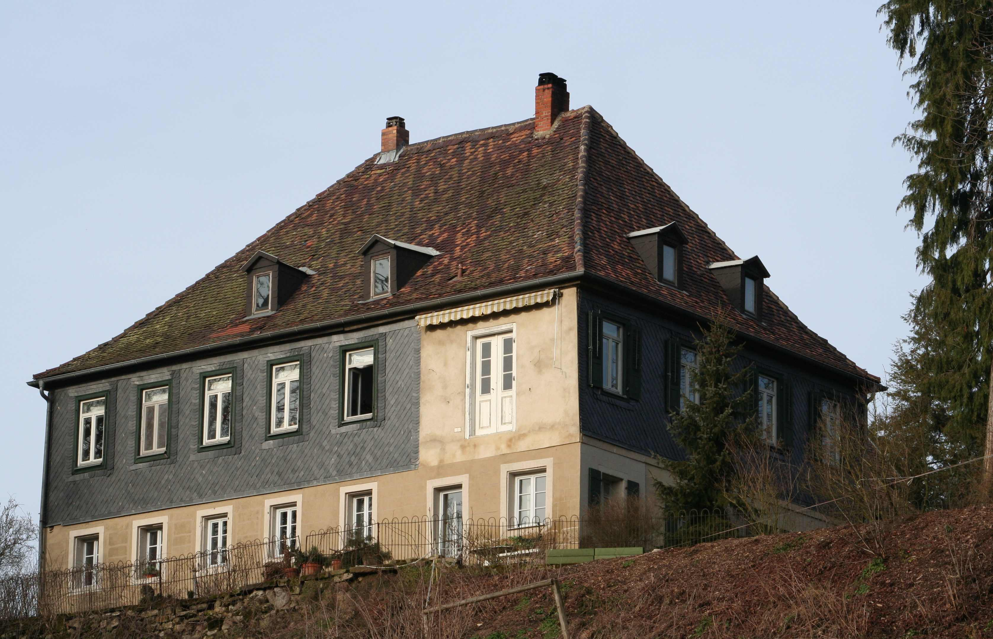 Schloss Eichhof in Coburg-Scheuerfeld